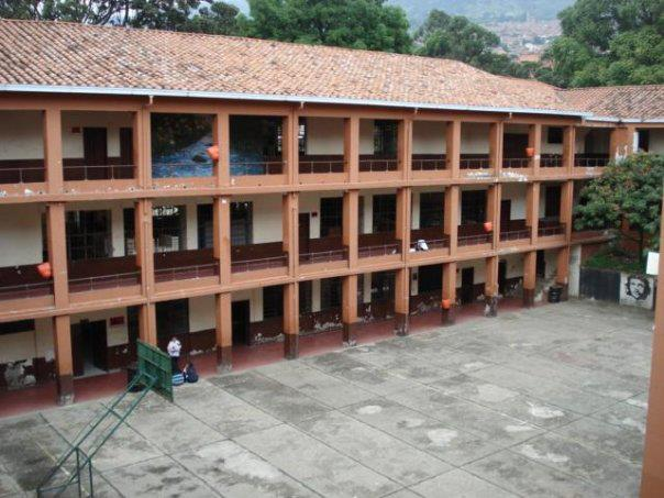 Bloque 1 Instituto Técnico Industrial Pascual Bravo, desde el interior del Bloque.